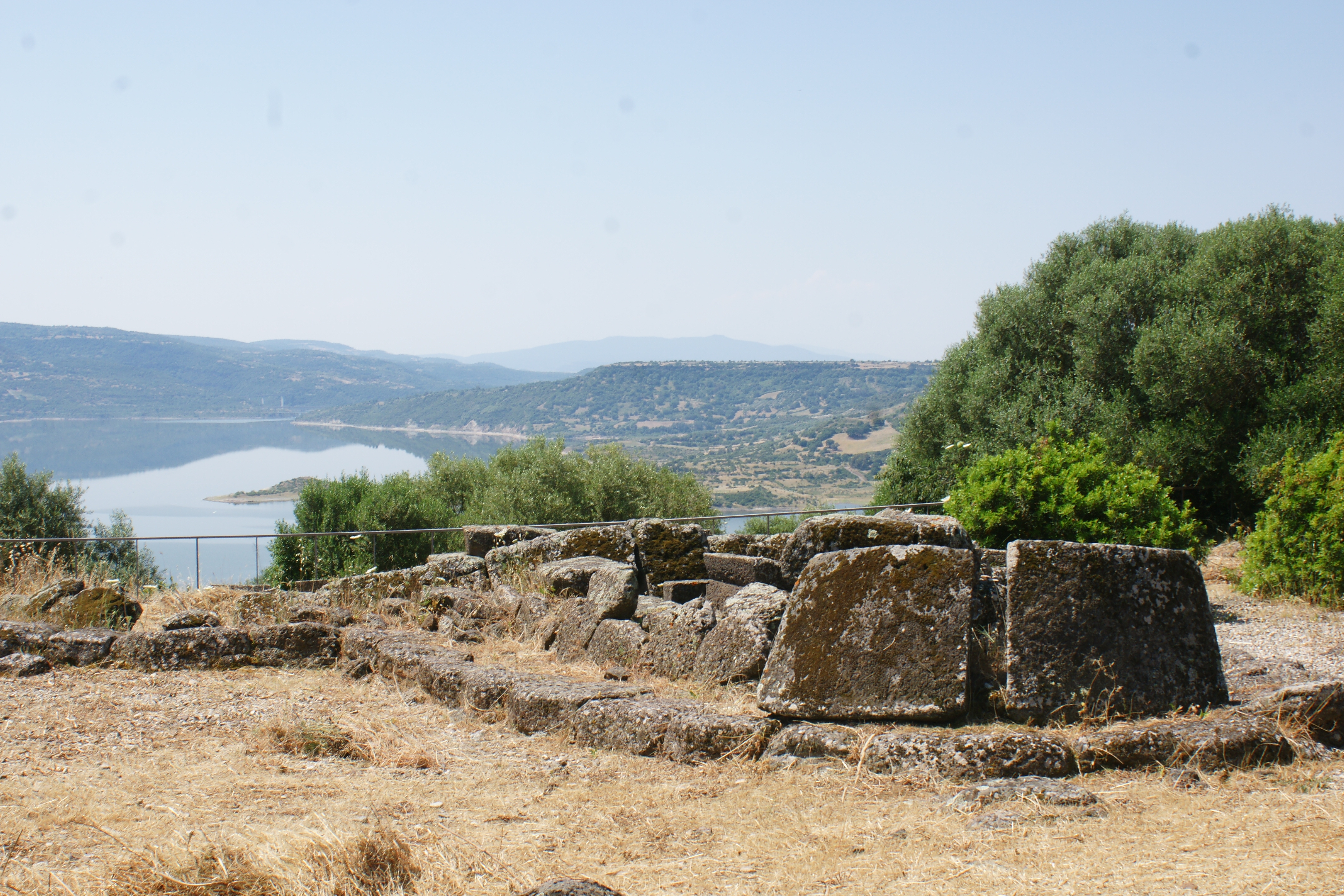 Nuraghe e tomba di gigante n.2 di Iloi - MIBAC This is a photo of a monument which is part of cultural heritage of Italy.